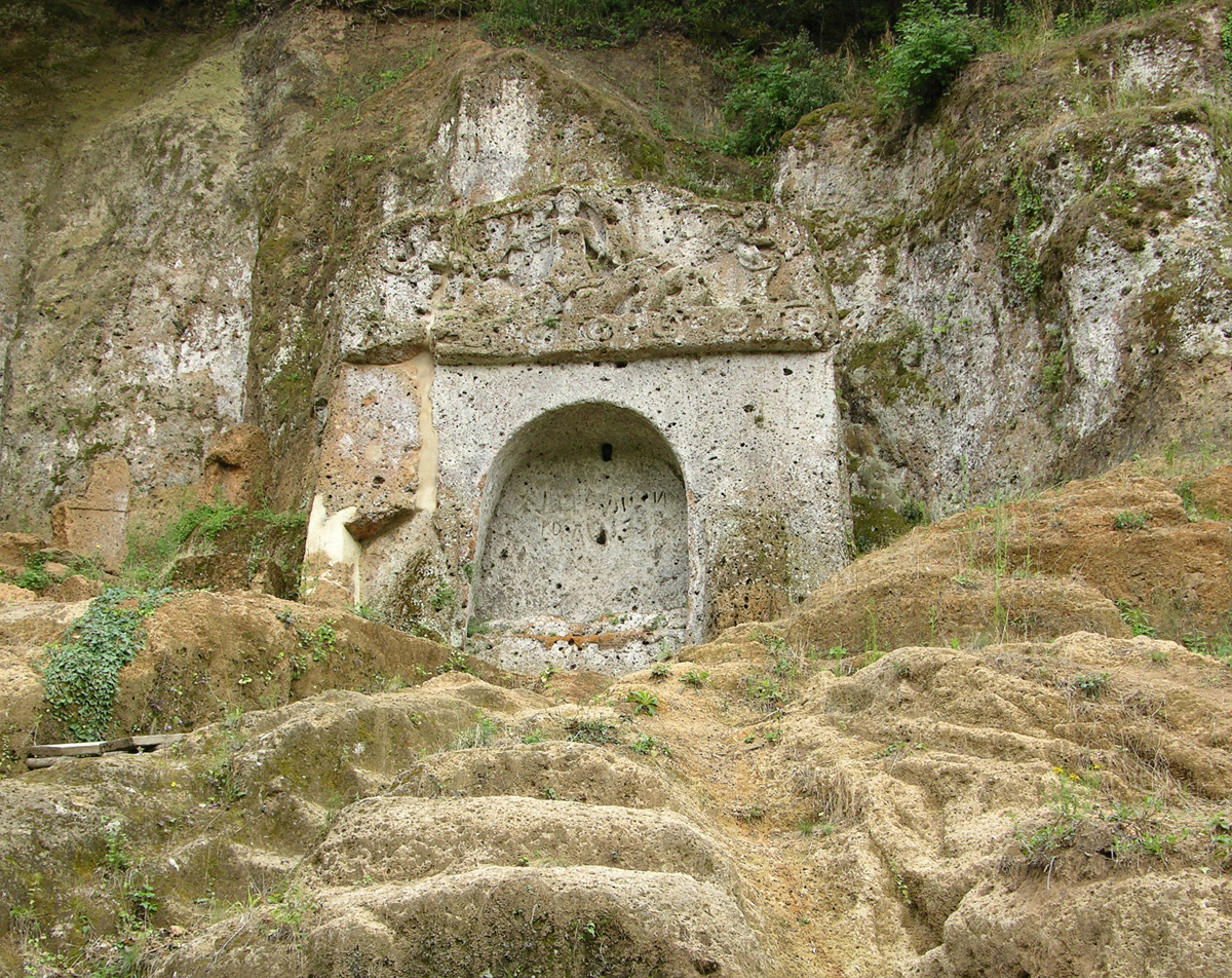 Tomba della Sirena nella Necropoli di Sovana, Tuscana, Italia.